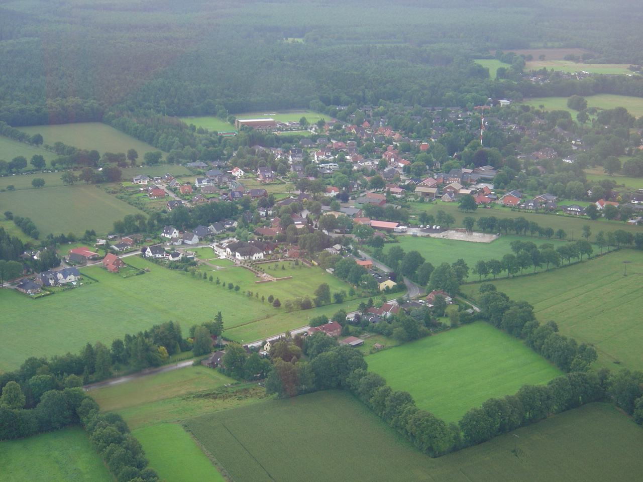 Luftbild der Gemeinde Hartenholm, Kreis Segeberg, Schleswig-Holstein Aufnahmedatum: 06.08.2005 Urheber: Benutzer:Wiki-observer